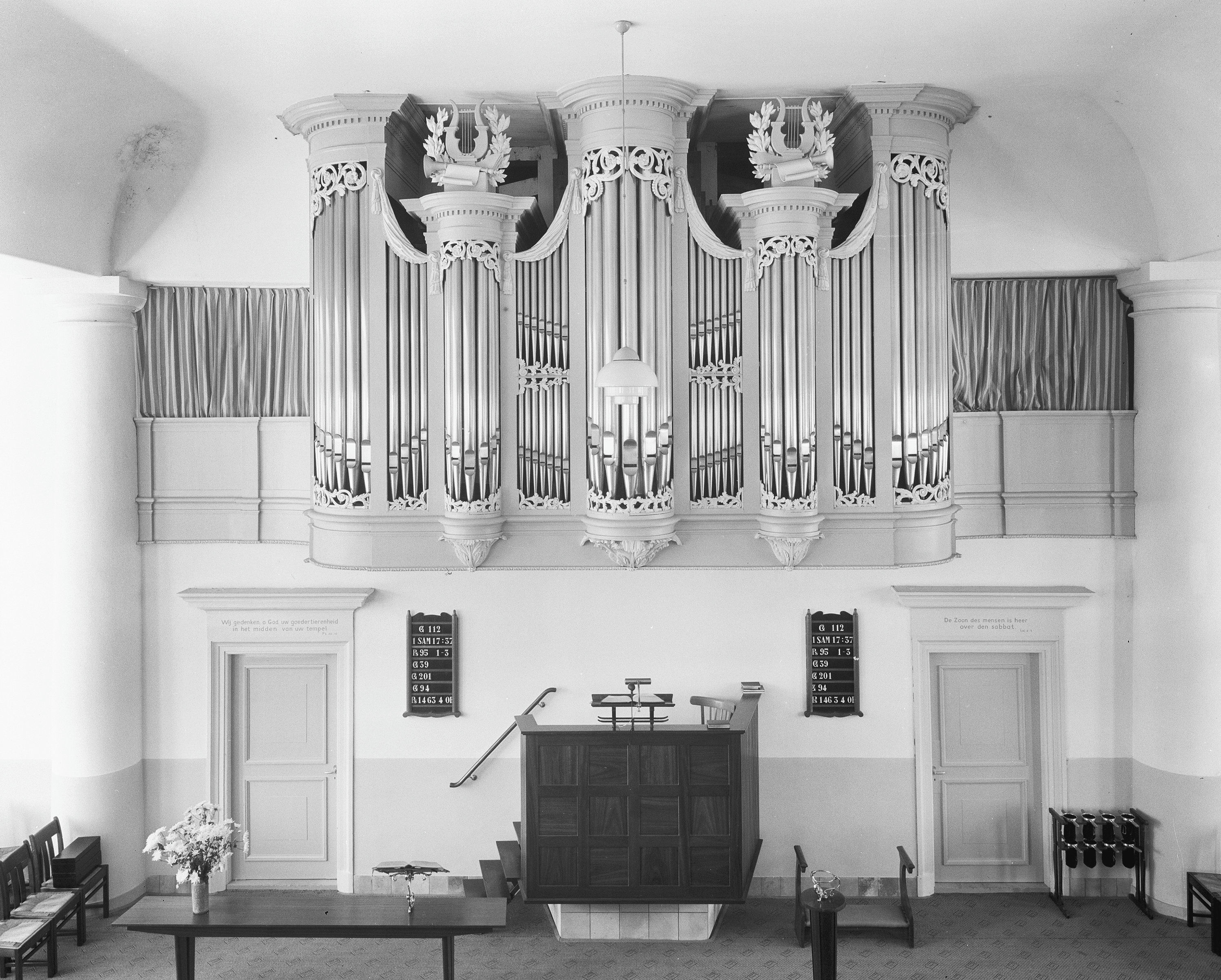 Nederlands Hervormde Kerk: kansel en orgel